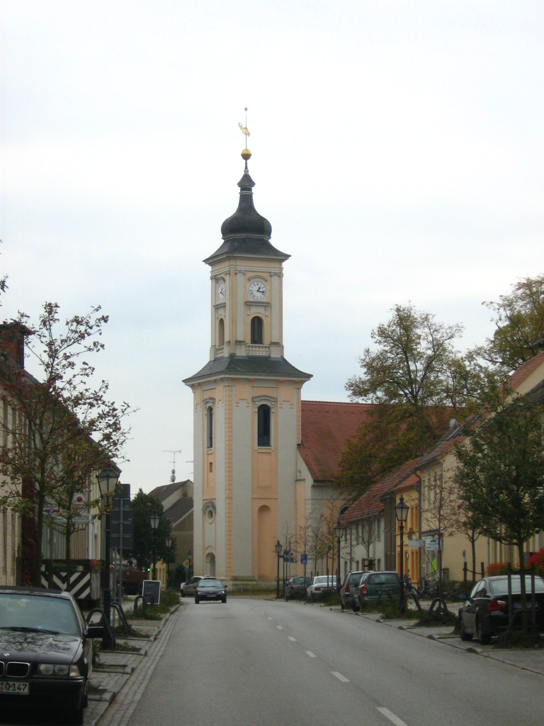 Kirche in Lindow (Mark) (Brandenburg)